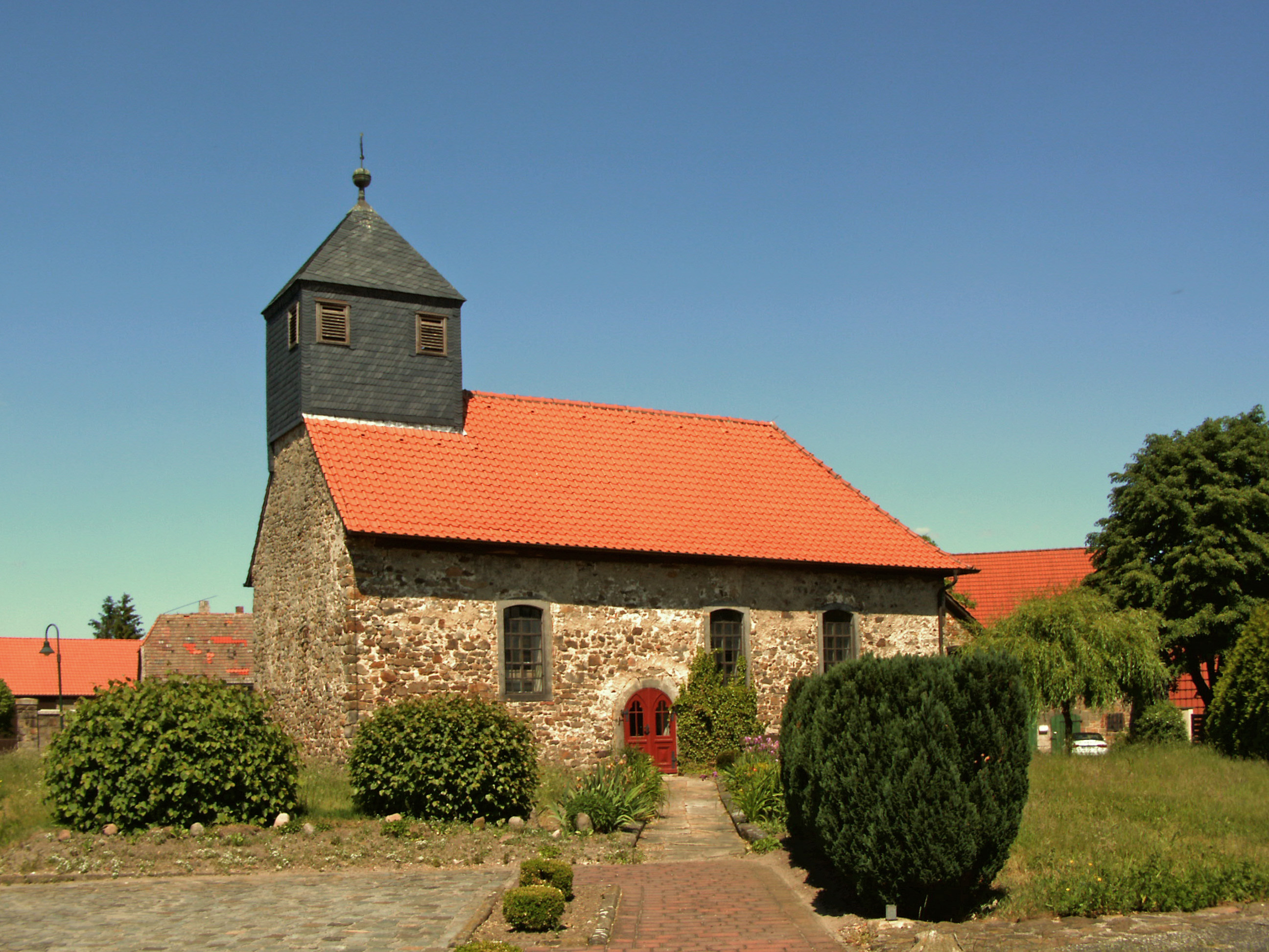 Evangelische Kirche in Döhren, Ortsteil von Oebisfelde-Weferlingen